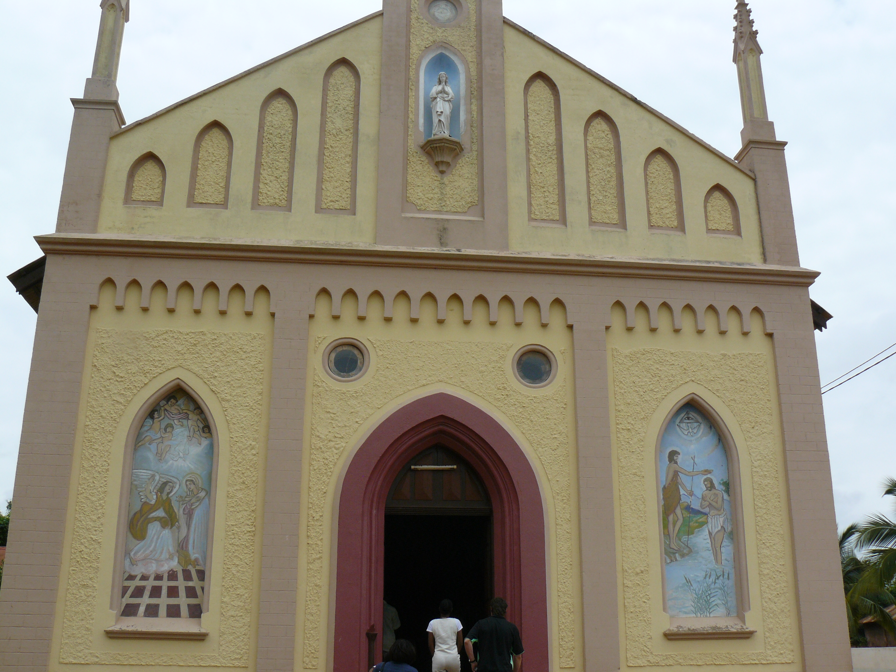 Photographie de la cathédrale Notre-Dame du Lac Togo à Togoville